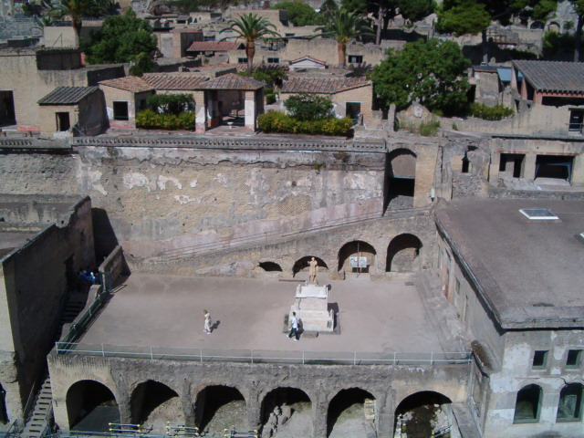 Herculaneum-Nonio Balbus terasza